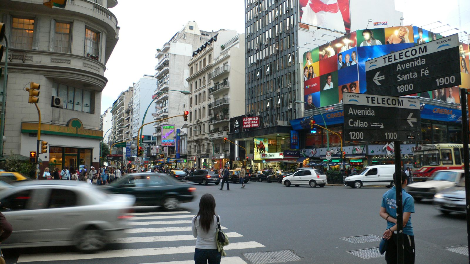 Santa Fe and Callao Avenues, Buenos Aires.